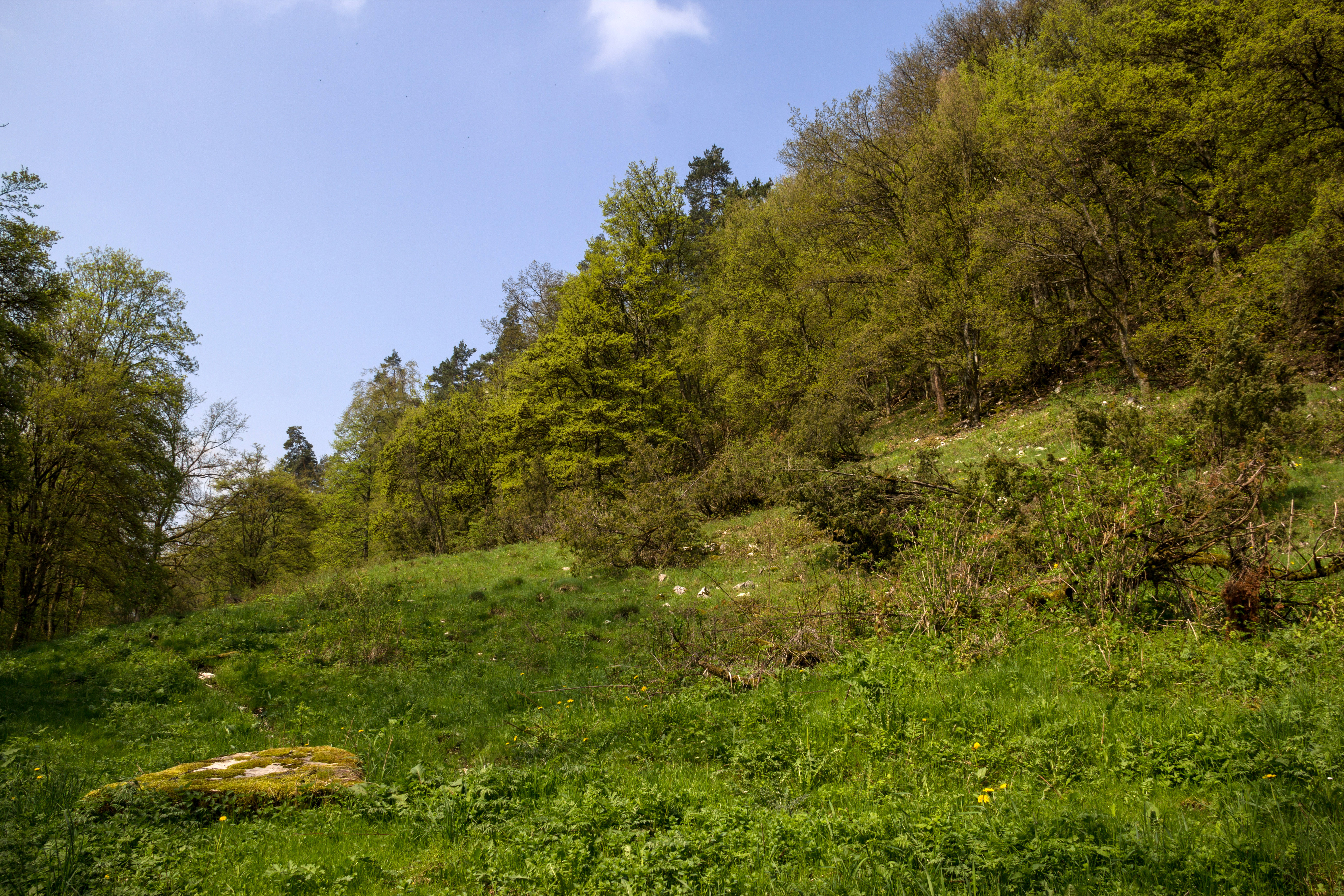 Oberes Molsberger Tal